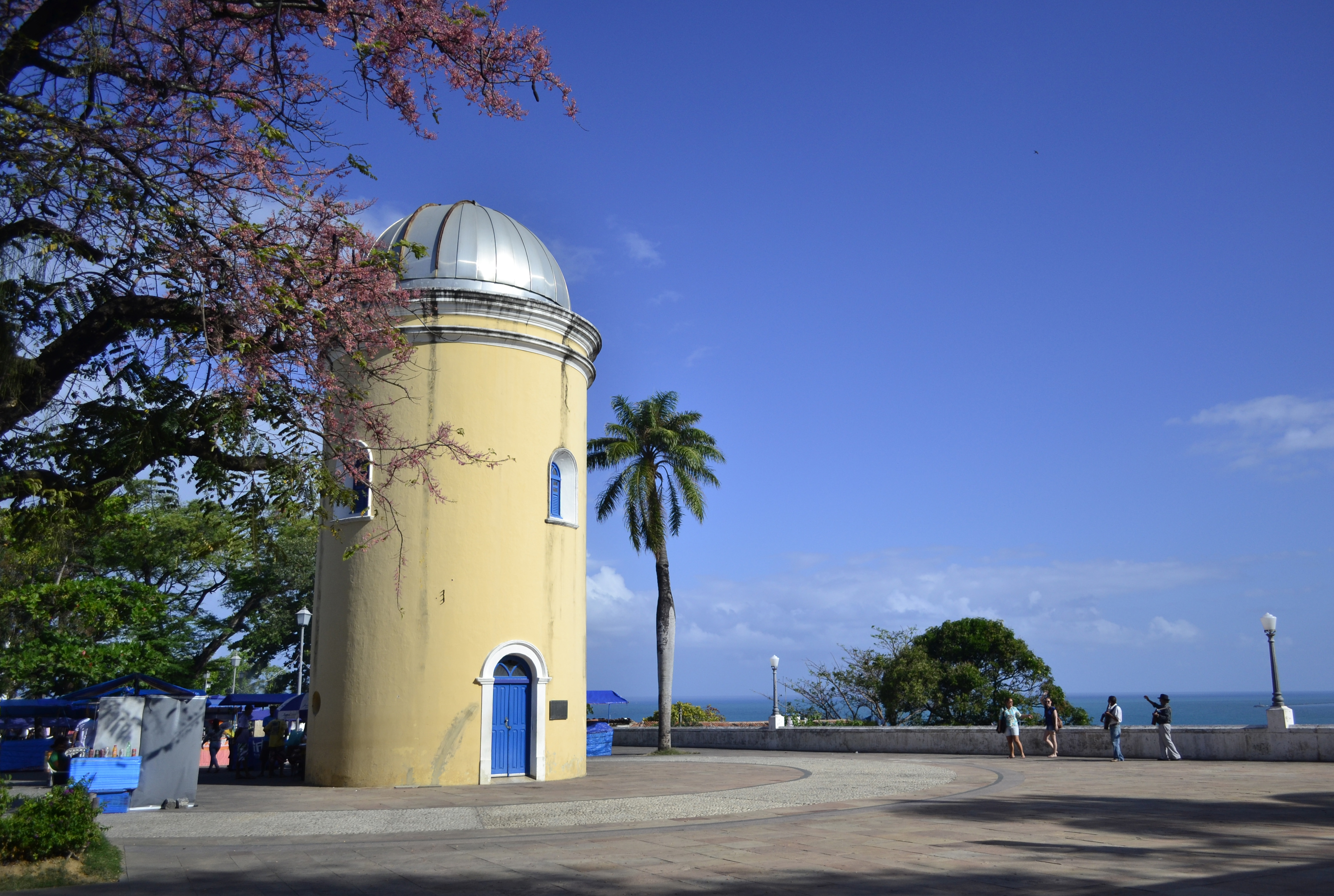 Observatório Astronômico do Alto da Sé - Olinda - Pernambuco - Brasil